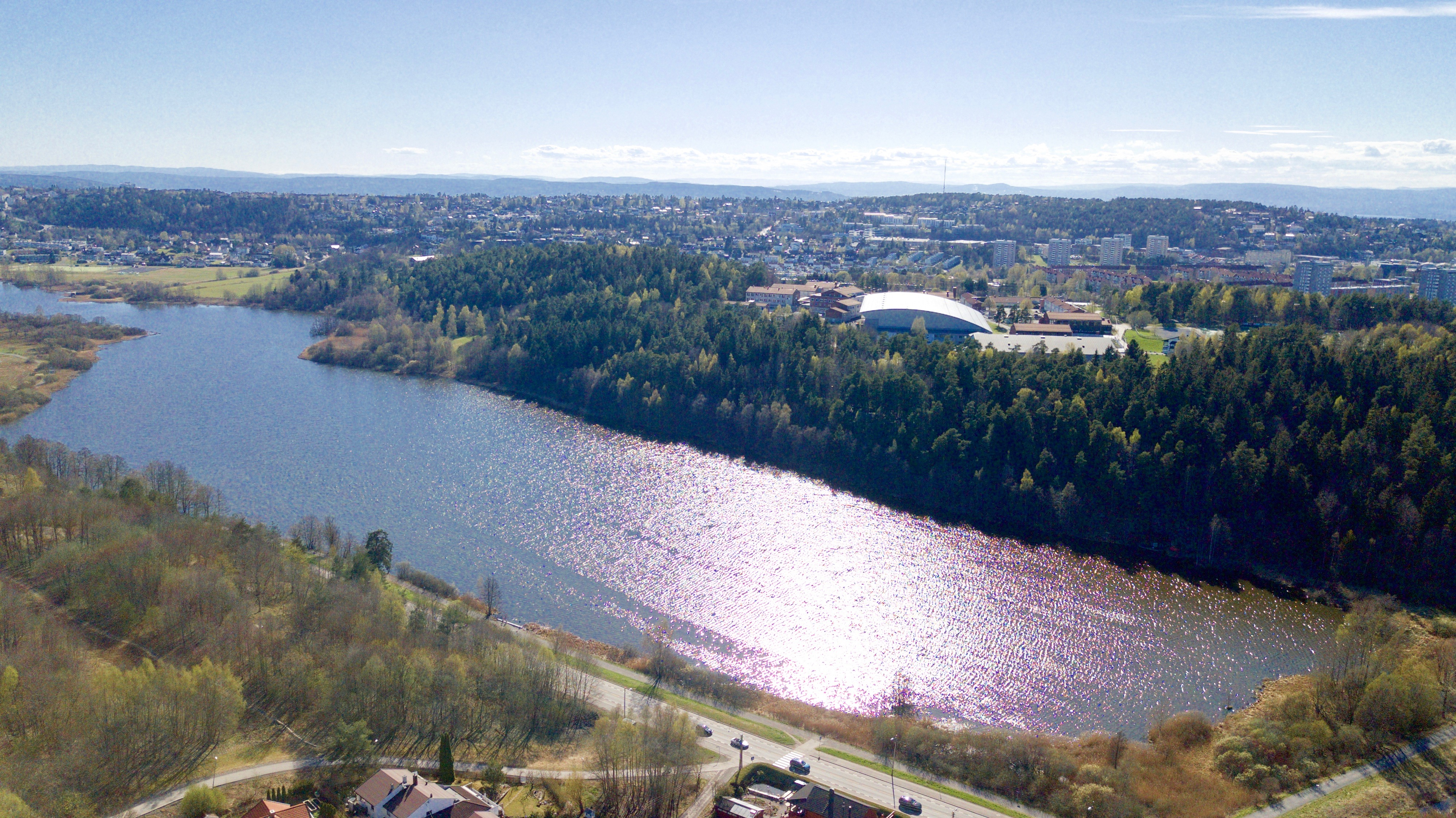 Østensjøvannet, i bakgrunnen sees Manglerud. Oslo.